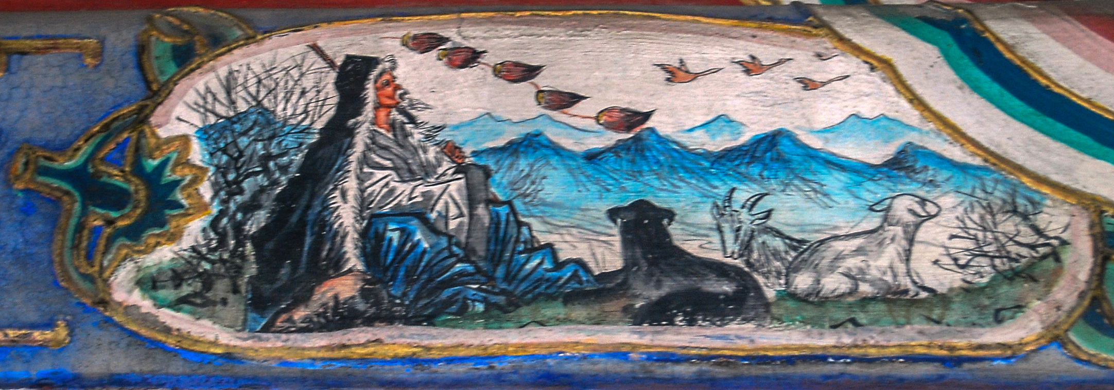 颐和园长廊彩绘：苏武牧羊